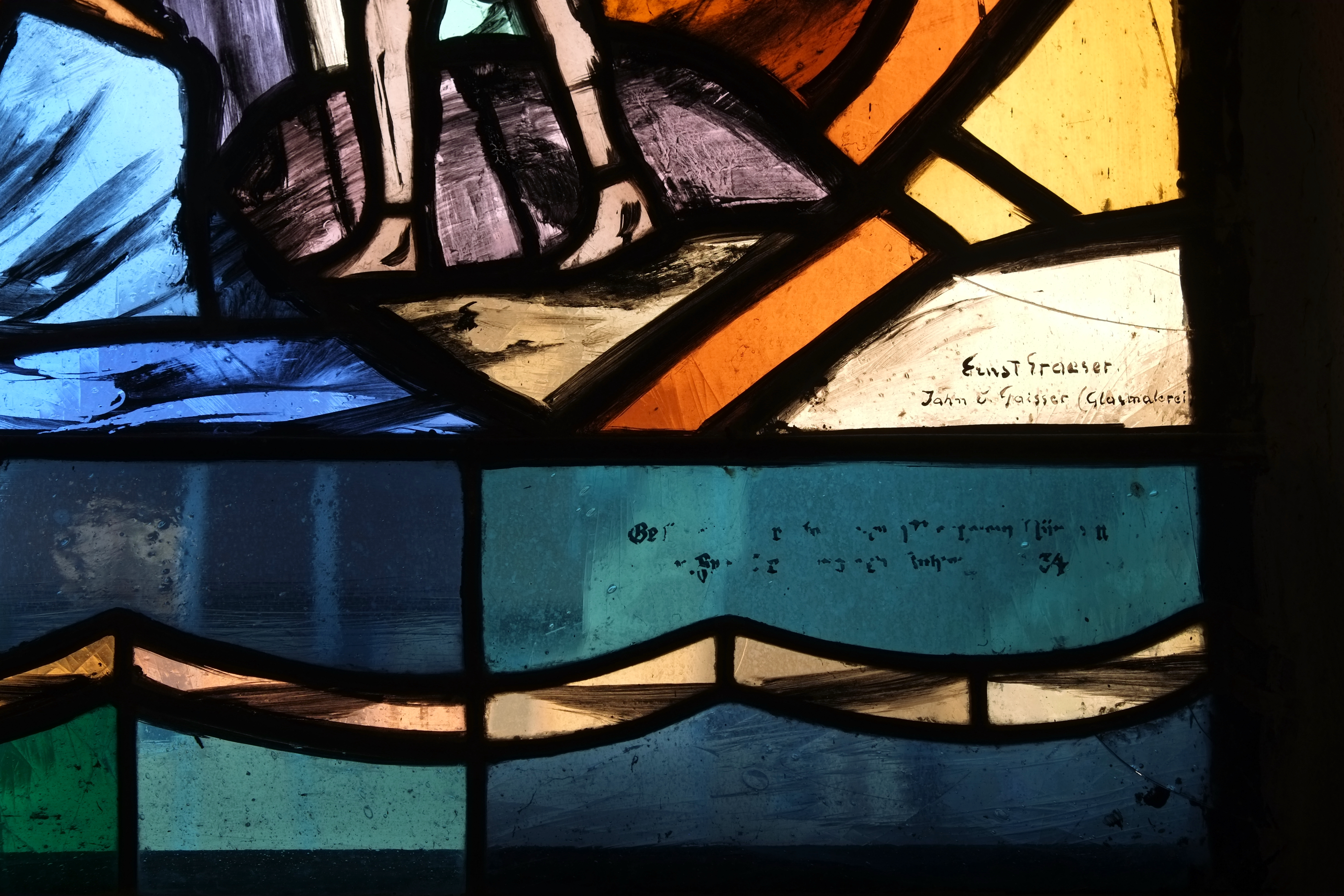 Dreifaltigkeitskirche in Dörzbach im Hohenlohekreis (Baden-Württemberg, Deutschland), Signatur im Bleiglasfenster: Ernst Graeser. Jahn & Gaisser Glasmalerei